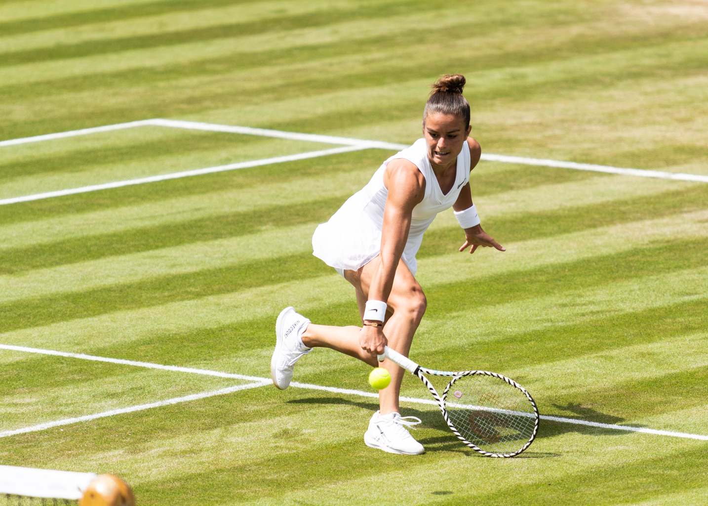 Maria Sakkari